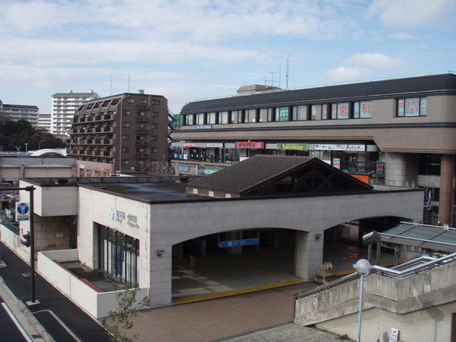 Nakagawa Station, Yokohama Municipal Subway Blue Line, Tsuzuki-ku, Yokohama, Japan